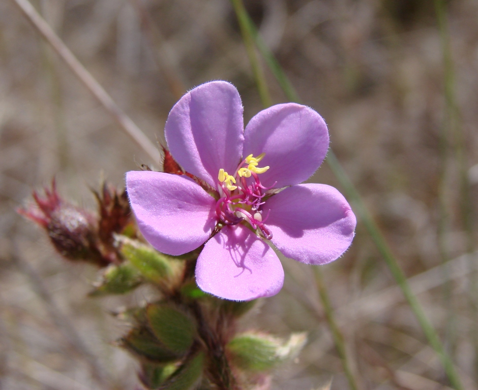 Desmocelis villosa - MELASTOMATACEAE Parque Nacional Grande Sertão Veredas - Chapada Gaúcha - Minas Gerais - Brasil.